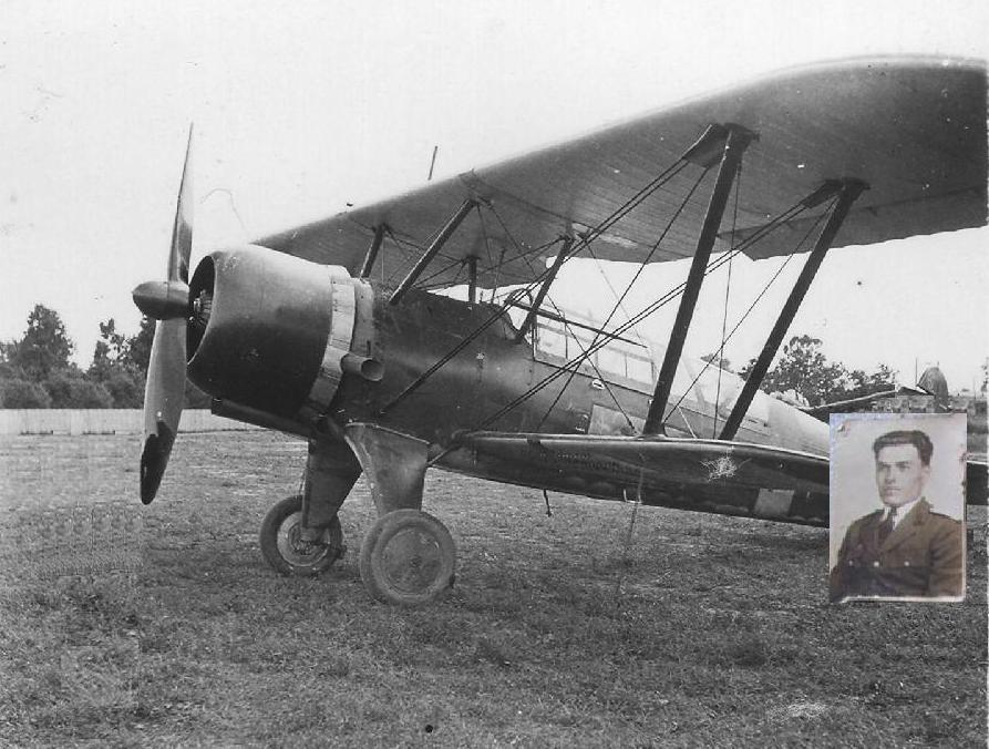 Autor - Măcreanu Iulian Descriere - fotografia sublocotenentului erou aviator Mircea Lipan, din comuna Bordei Verde, căzut la datorie în prima zi de război, 21 iunie 1941, alături de fotografia unui avion IAR-37 Restricţii - fişierul poate fi folosit fără restricţii datorită vechimii lor, imaginile originale fiind mai vechi de 70 de ani (1941) Fotografiile originale ale sublocotenentului erou Mircea Lipan se găsesc în patrimoniul Muzeului Ianca (judeţul Brăila)